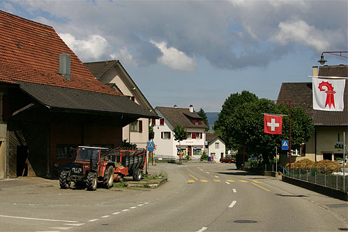 Mitten in Wahlen